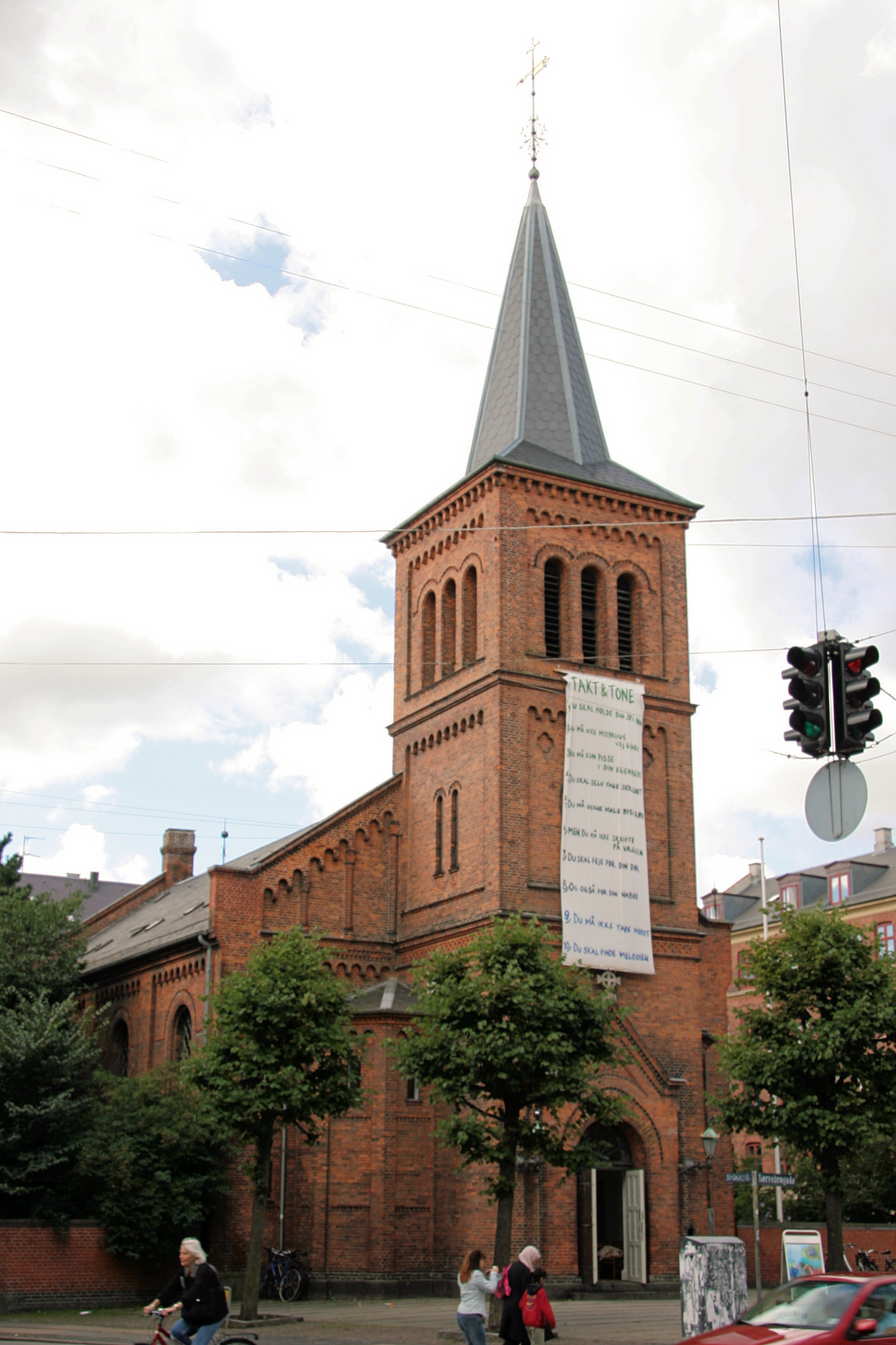 Sankt Stefans Kirke in Copenhagen, Denmark.